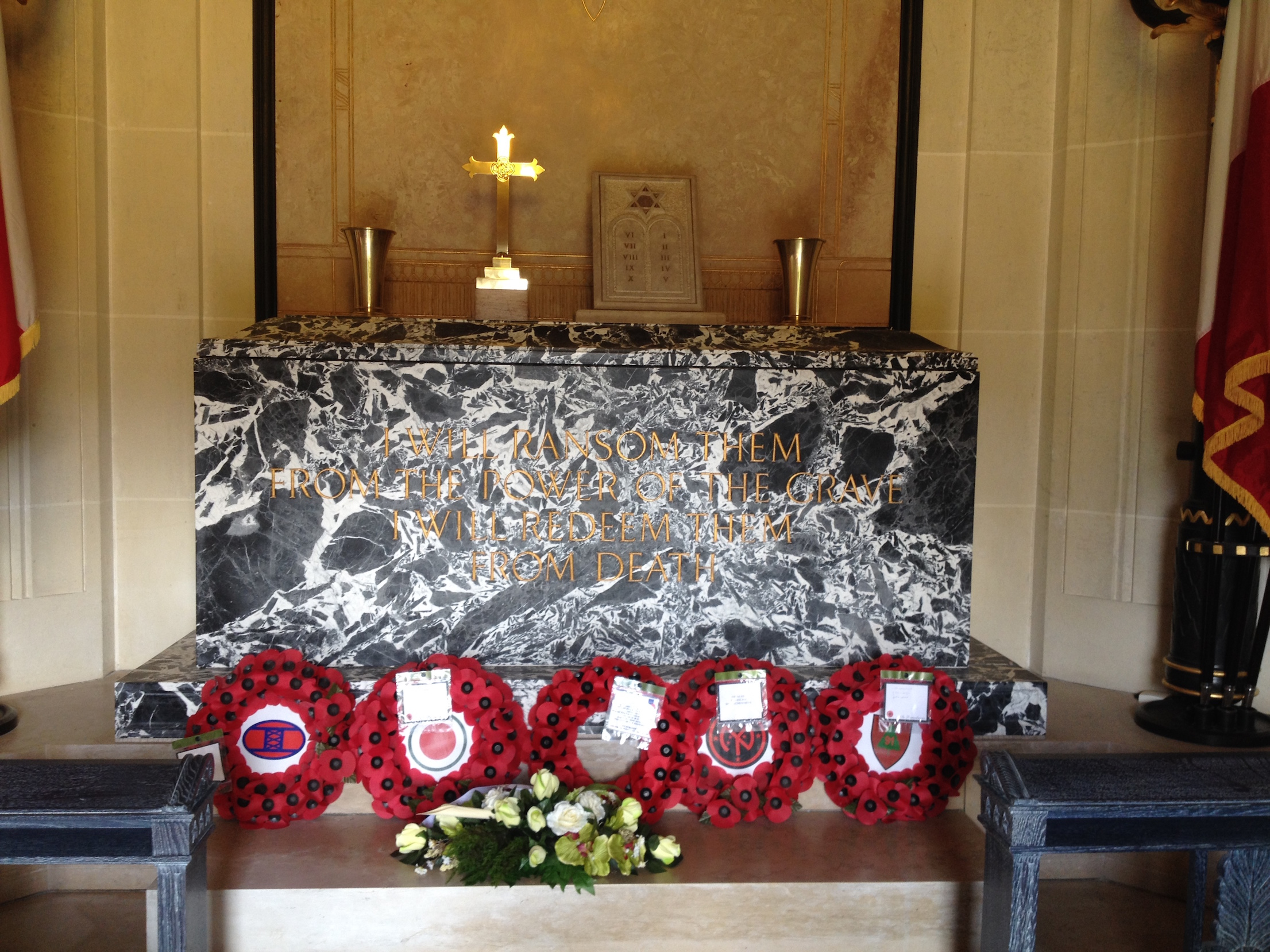 Flanders Field American Cemetery